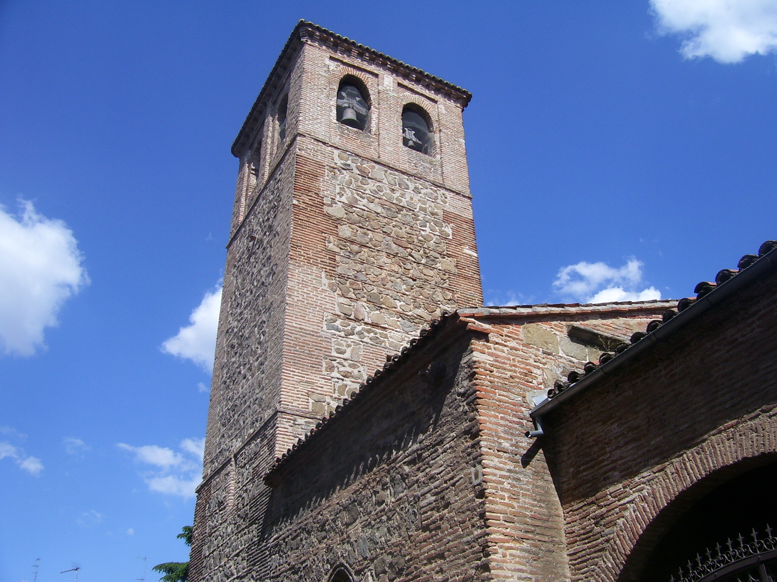 Torre de la Iglesia de Santiago el Nuevo, en Talavera de la Reina (Toledo).